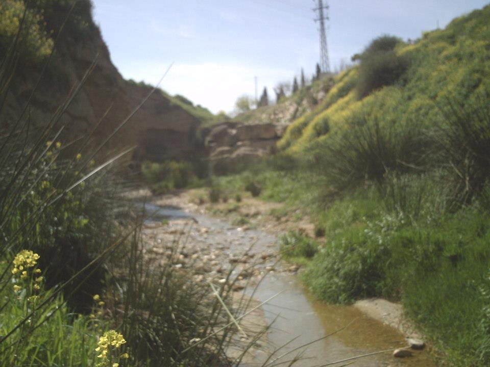 Río Salado a su paso por la localidad de La Malahá, en la provincia de Granada (España). Al fondo se pueden apreciar los grandes peñones de Jaque.